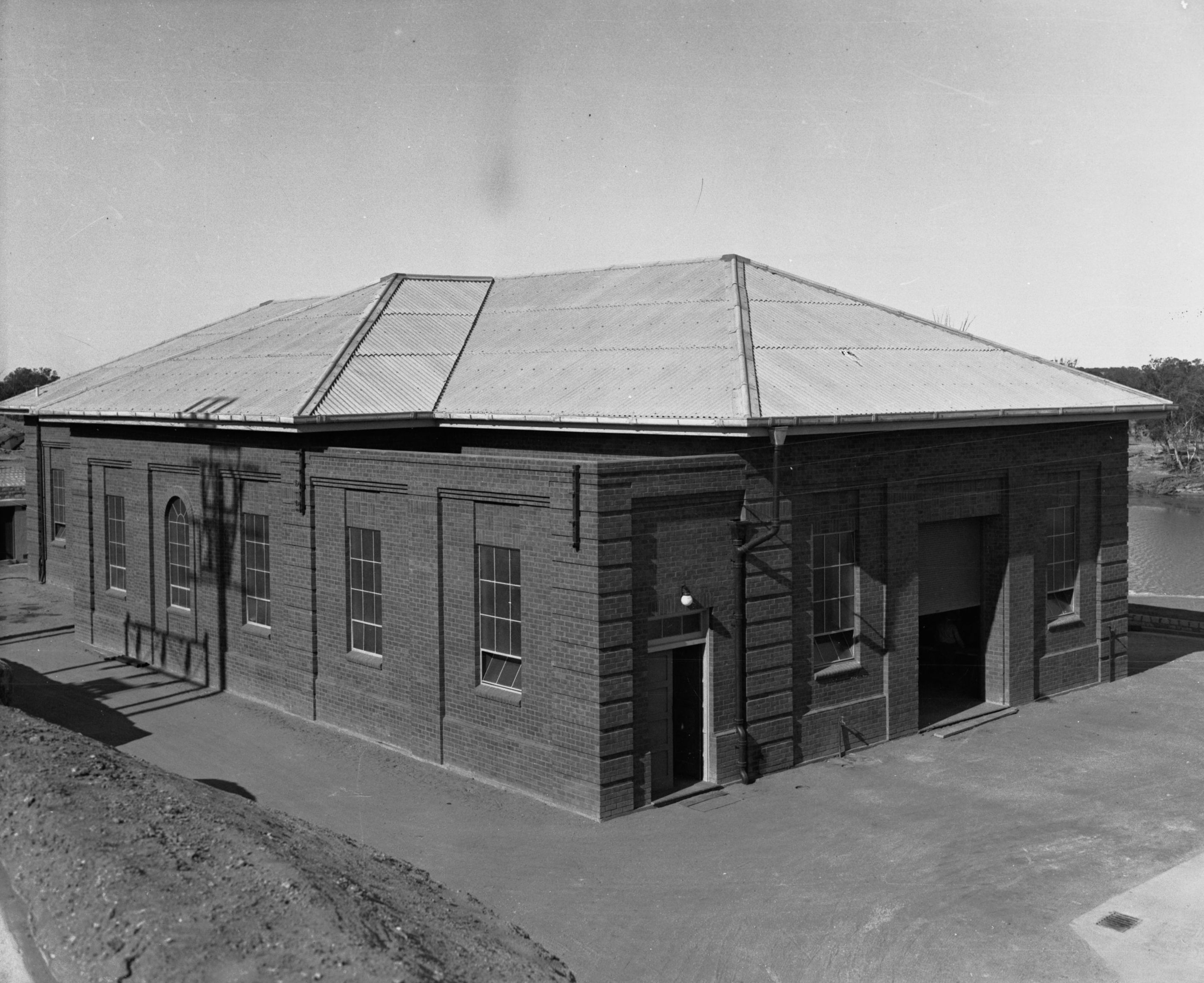 At Morgan (G. Brooks)